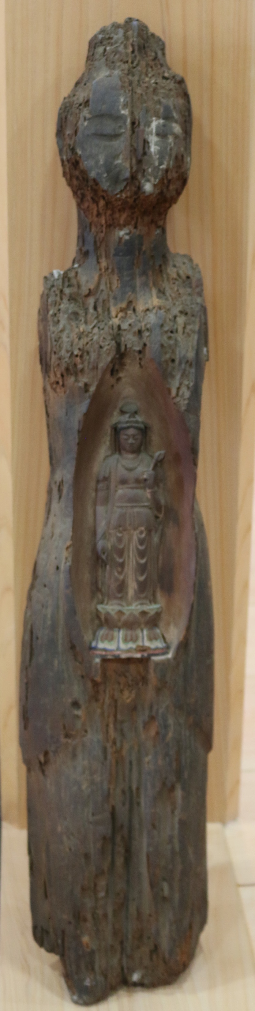 豊中市瑞輪寺の仏像。住職によると、「荒木村重の乱」のときに焼け残った仏像との由来。 JPEG画像。